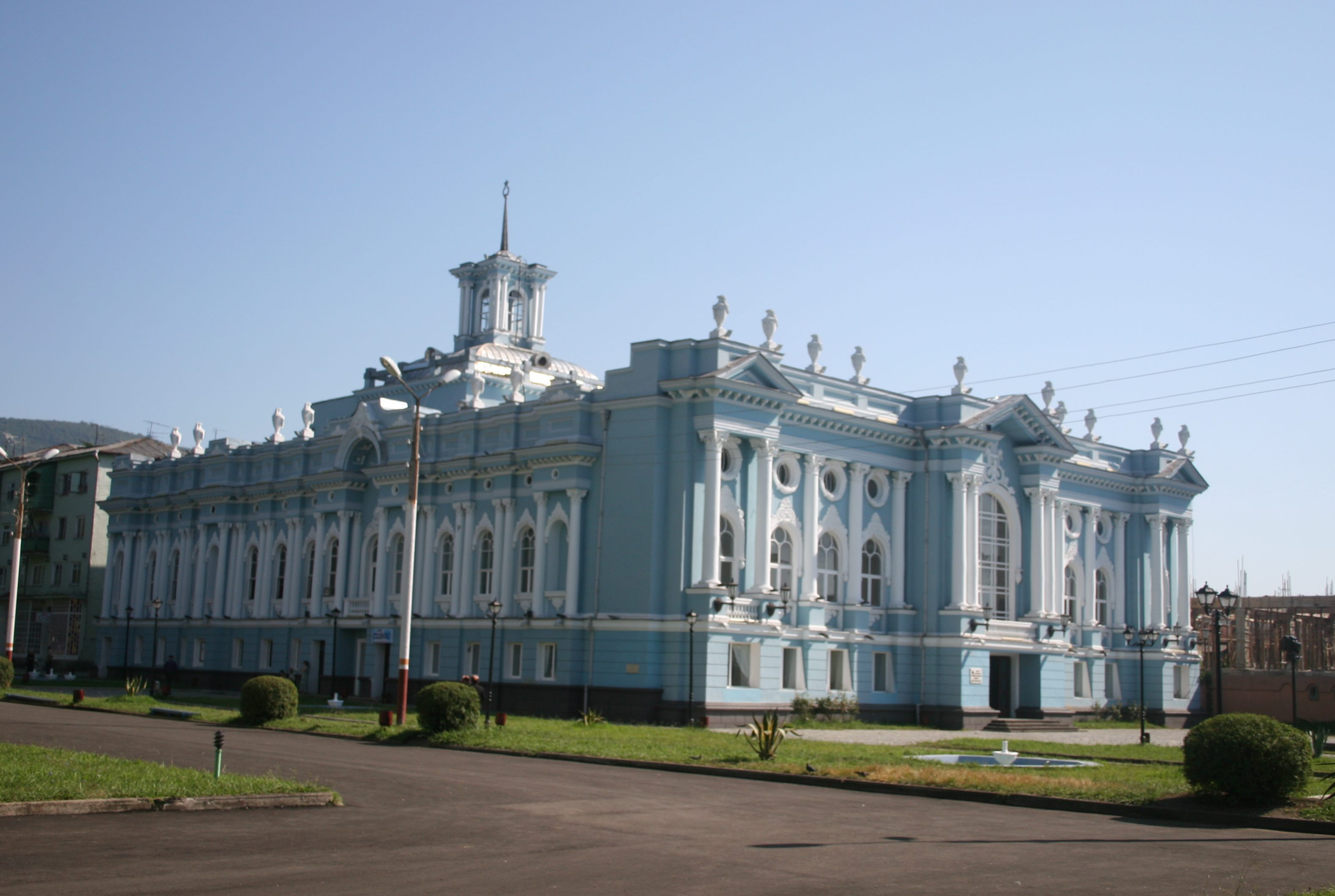 სენაკის აკაკი ხორავას სახ. თეატრი. ალსანდრო.